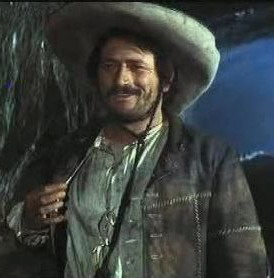 Glauco Onorato in W Django!